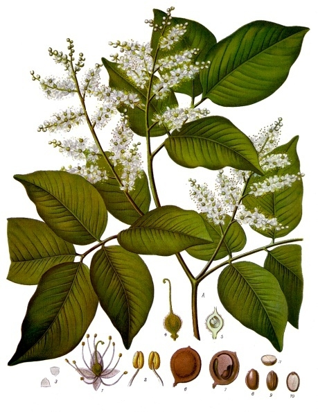 Copaifera. A blühender Zweig, nat. Gr.; 1 Blüthe vergr.; 2 Staubgefässe, desgl.; 3 Pollen, desgl.; 4 Stempel, desgl.; 5 Fruchtknoten im Querschnitt; 6 Frucht, nat. Gr.; 7 Fruchthälfte mit Samen, desgl.; 8 und 9 Same von der Seiten- und Bauchfläche, desgl.; 10 und 11 derselbe in Längs- und Querschnitt.